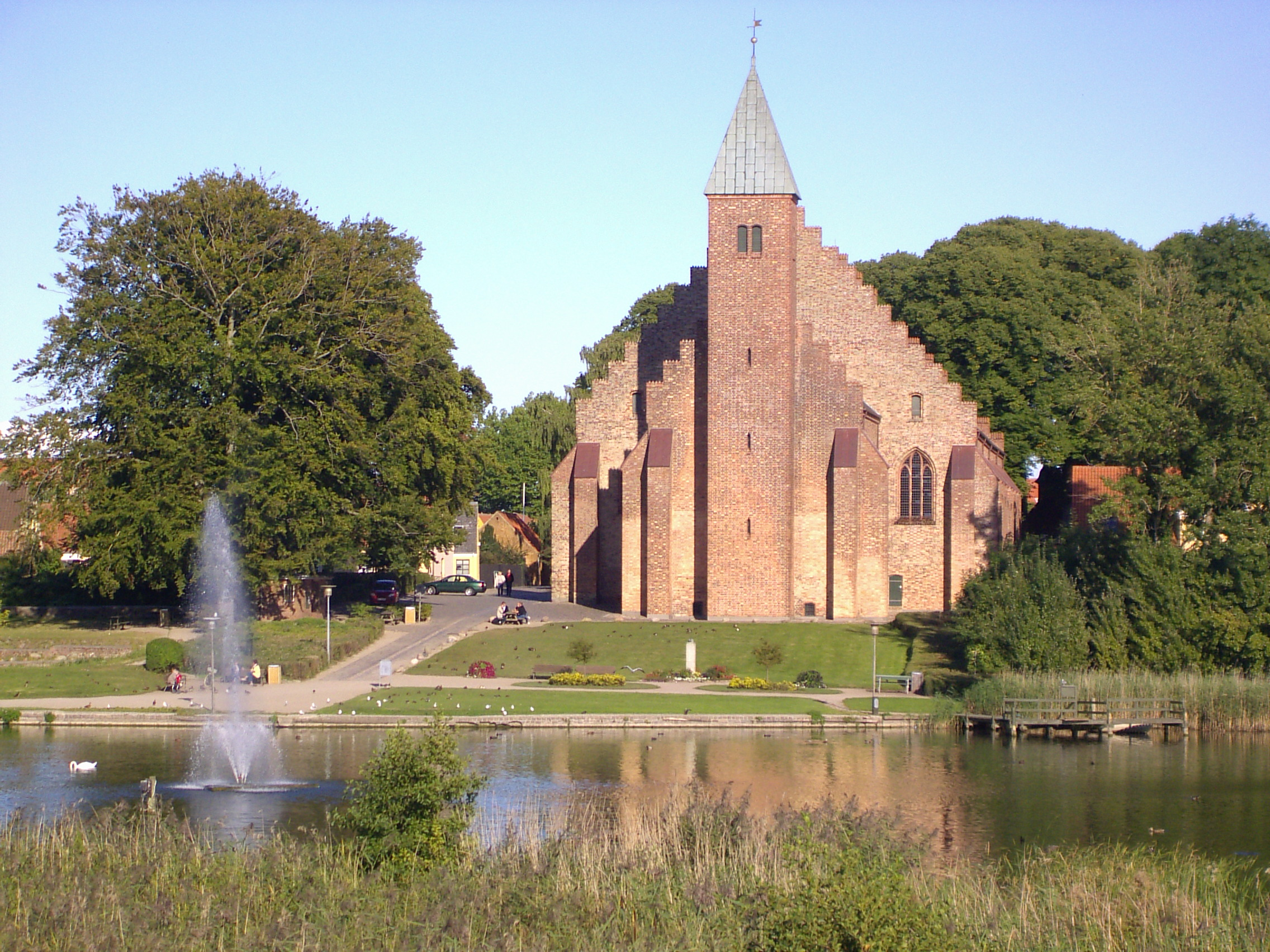 Maribo Domkirke Date: 2005.09.17 Author: Sir48